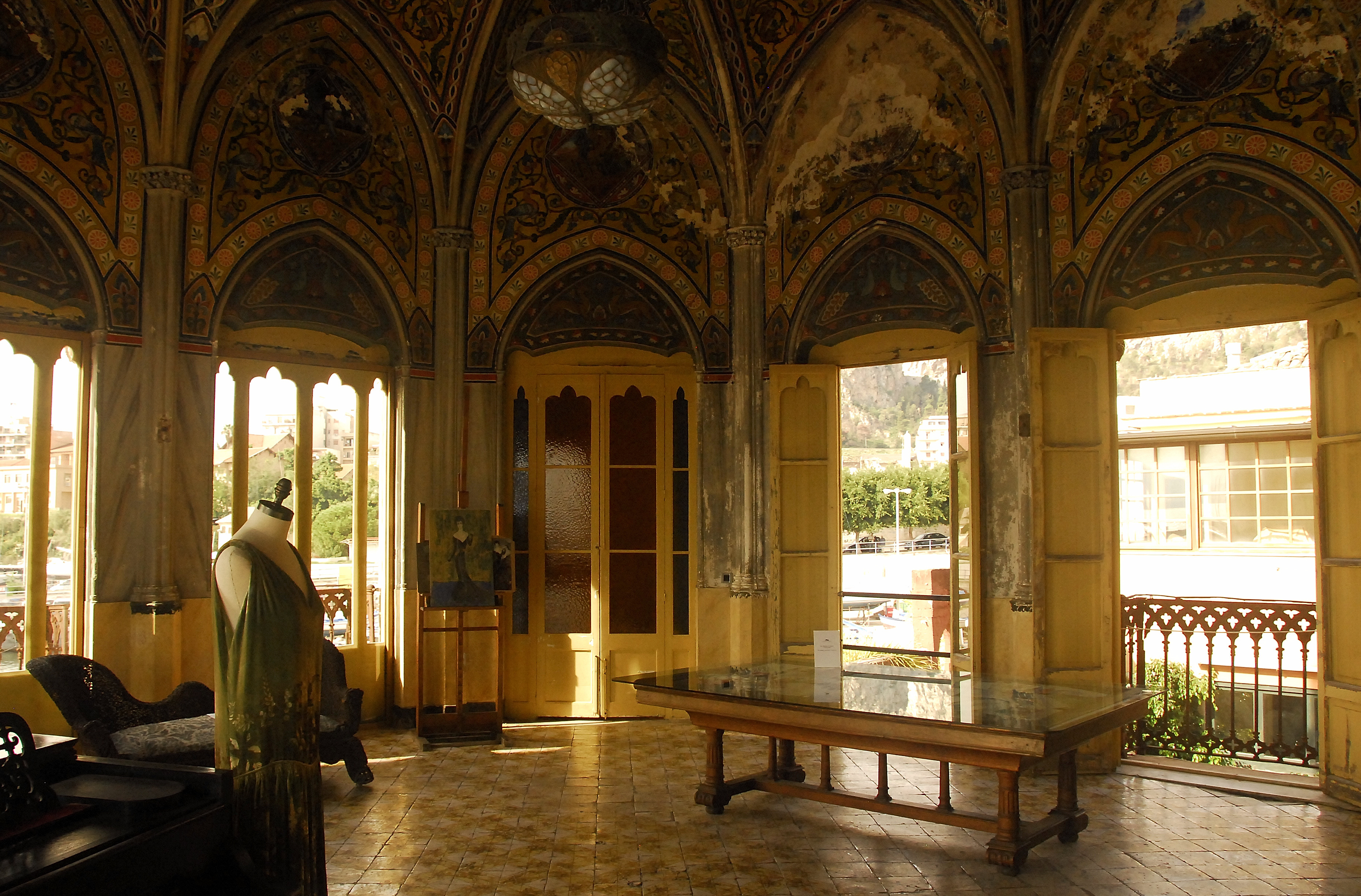 Palermo, ITA